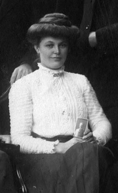 Ingrid Persdotter, servitris på studentcaféet Tua samt på Grand Hotel i Lund. Detalj ur gruppfoto från 1907. Bildkälla: AFs Arkiv & Studentmuseum, Lund.